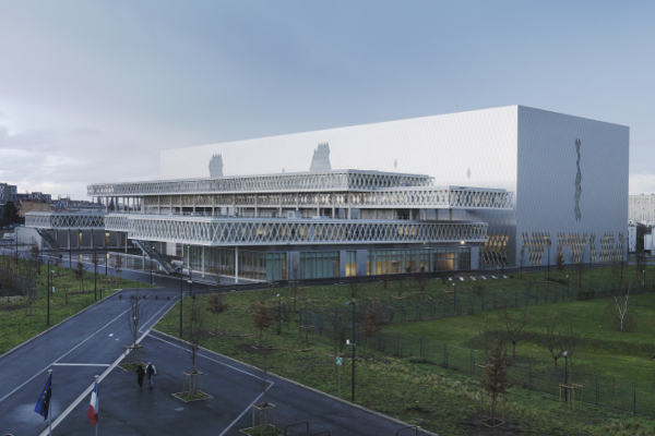 Site-de-Pierrefitte-sur-Seine (Architecte Massimiliano Fuksas). Archives nationales (France)